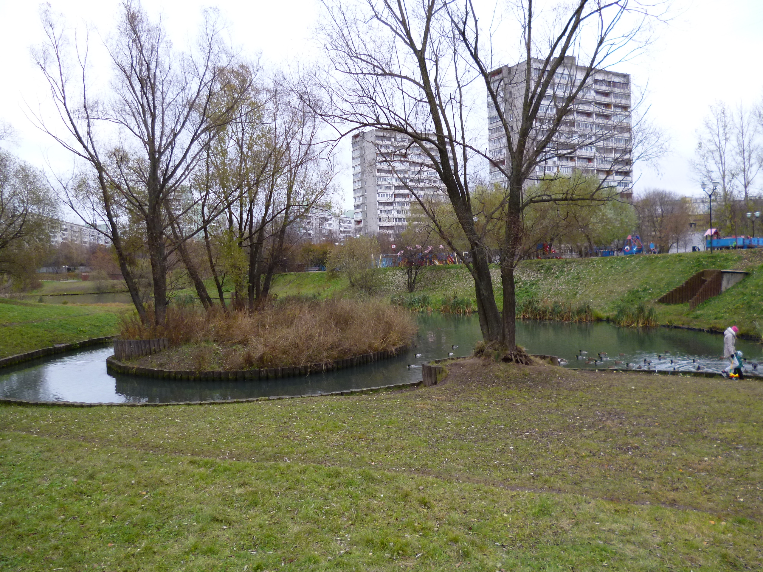 Сухое устье Самотышки (Москва)